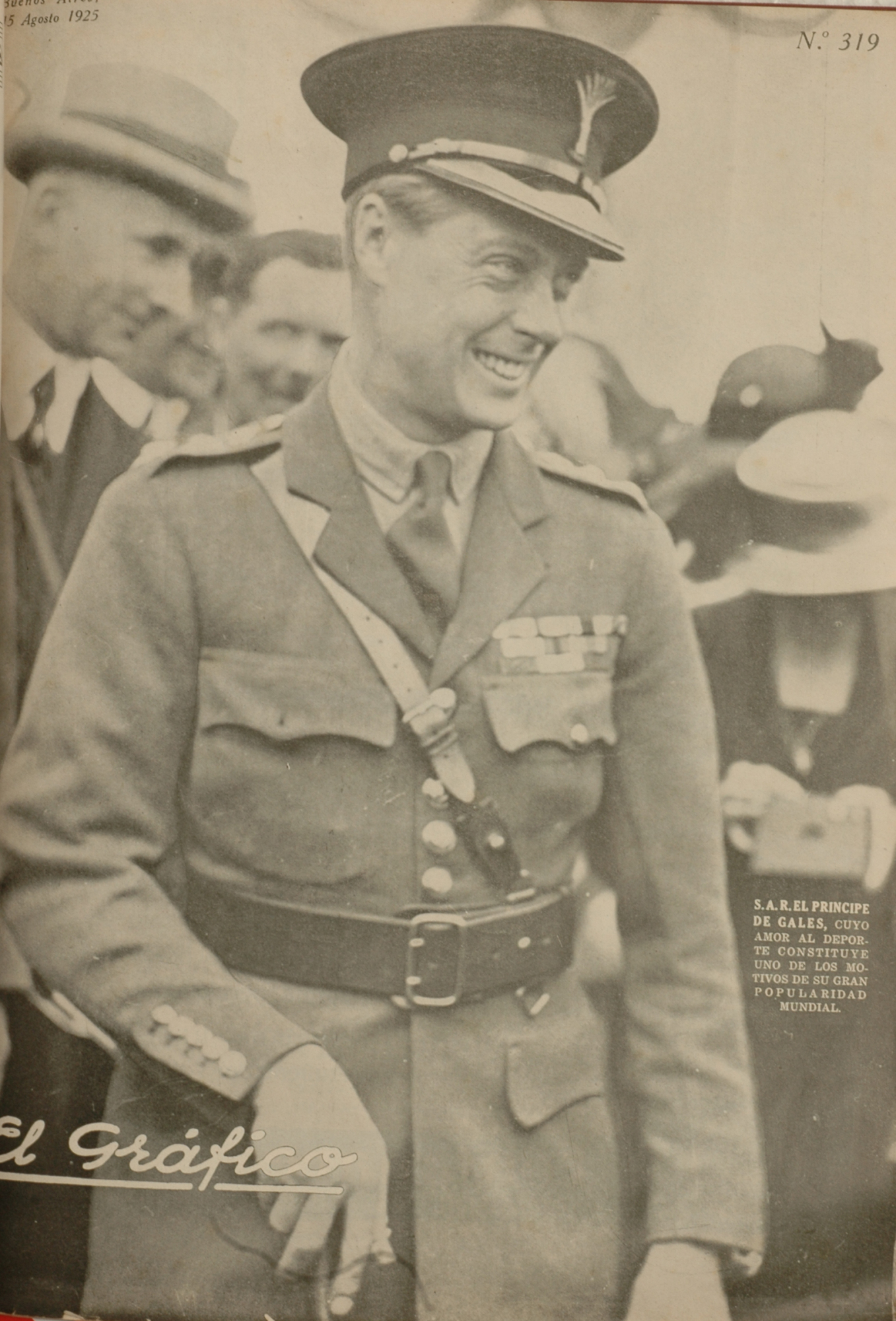 El Grafico del 15 de Agosto de 1925. Edicion 319